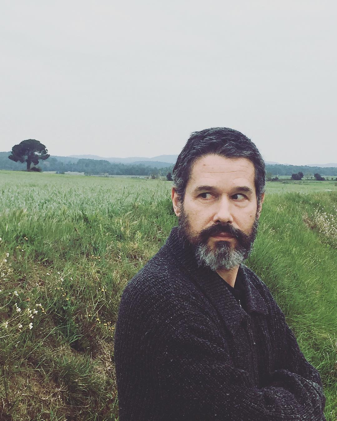 Retrat de'n Marc Romera i Roca